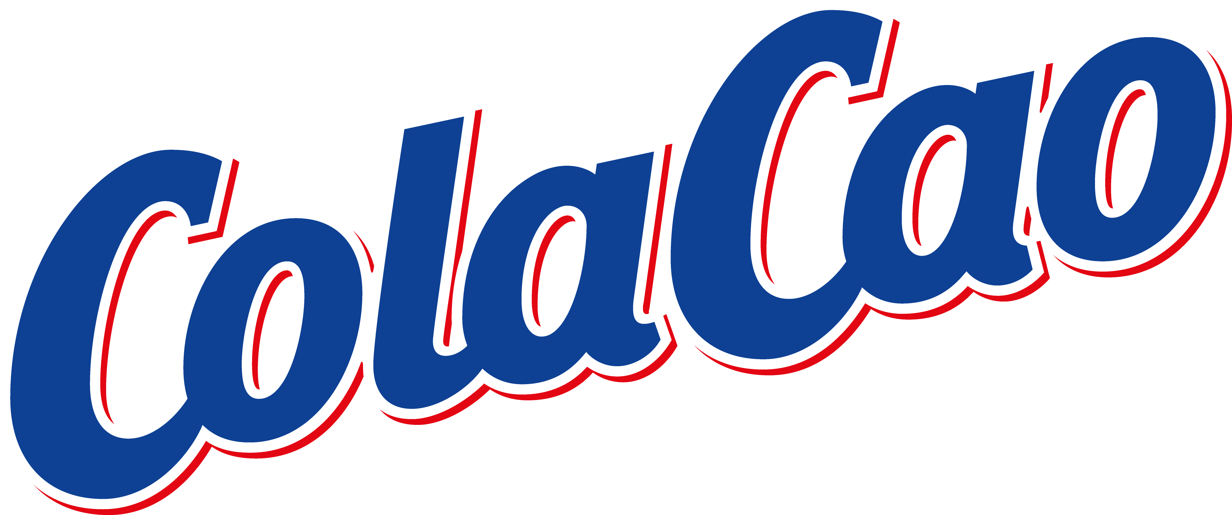 Logo de la marca española Cola Cao, perteneciente al grupo Idilia Foods